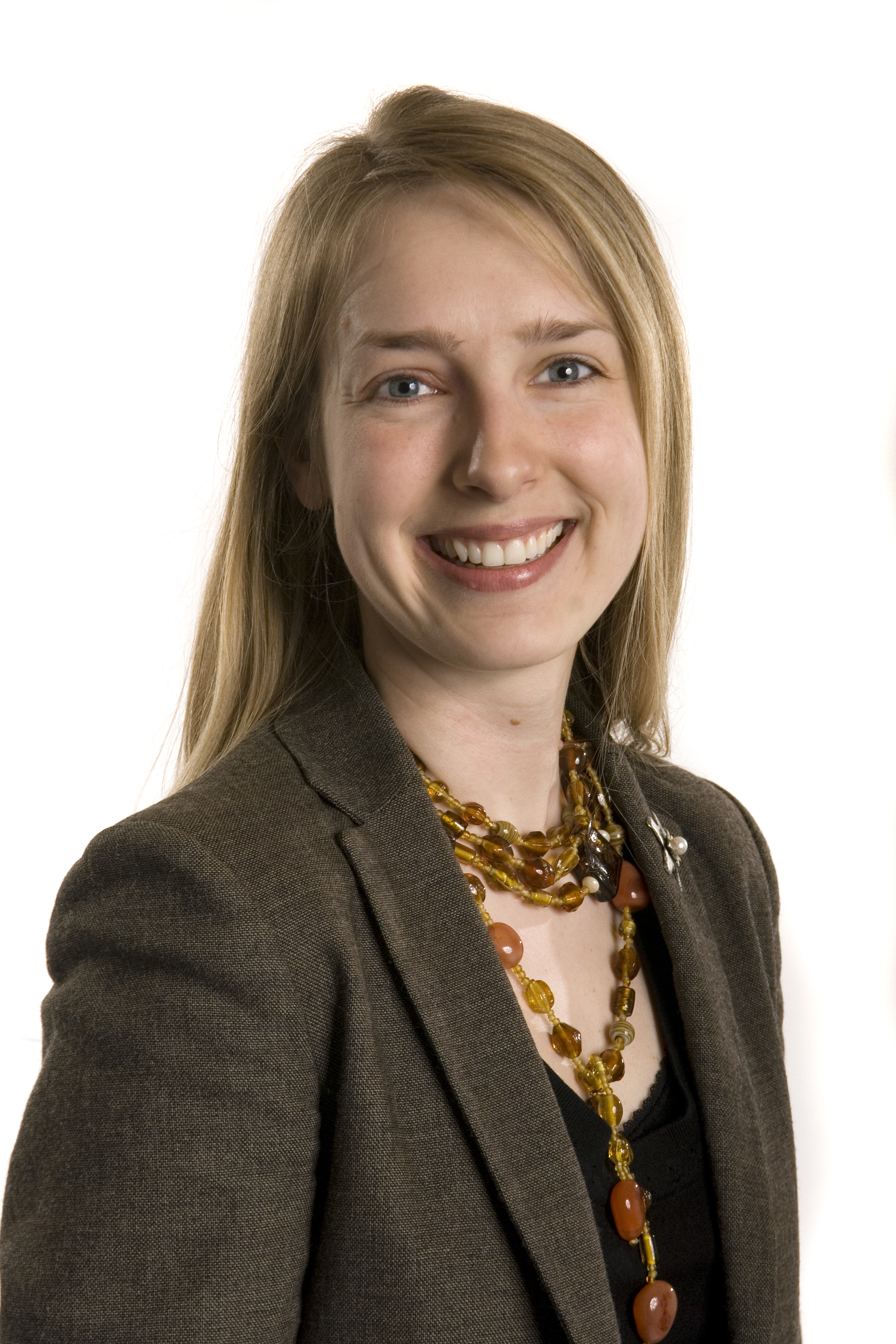 Foto: Tone Staven